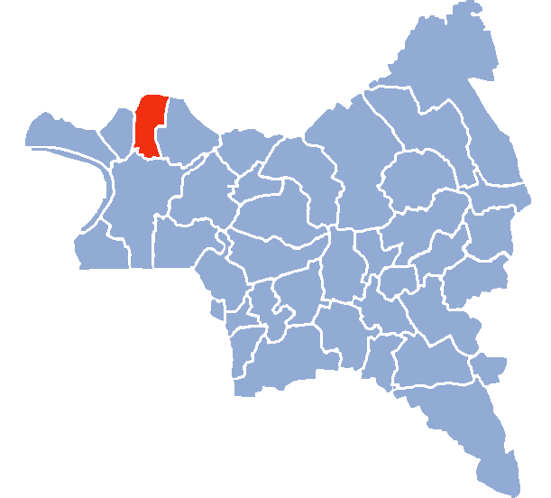 Auteur Hervé SUAUDEAU Licensing Catégorie:Cartes de Seine-saint-Denis Catégorie:Pierrefitte-sur-Seine